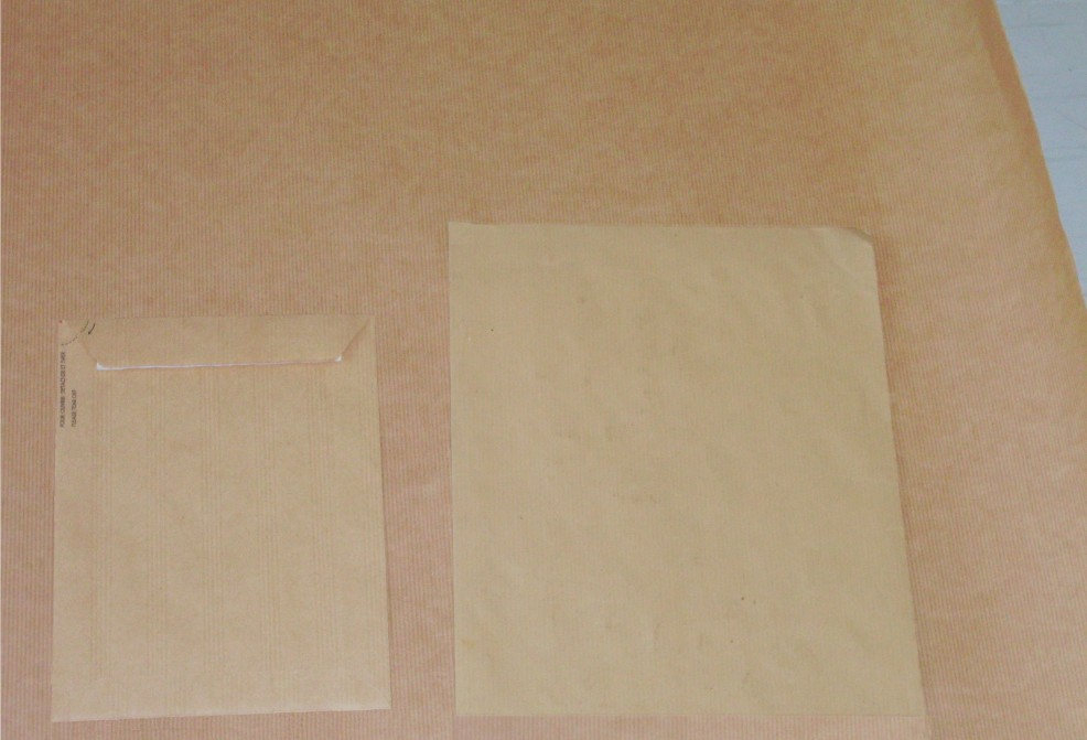 image perso modifier avec le logiciel gimp